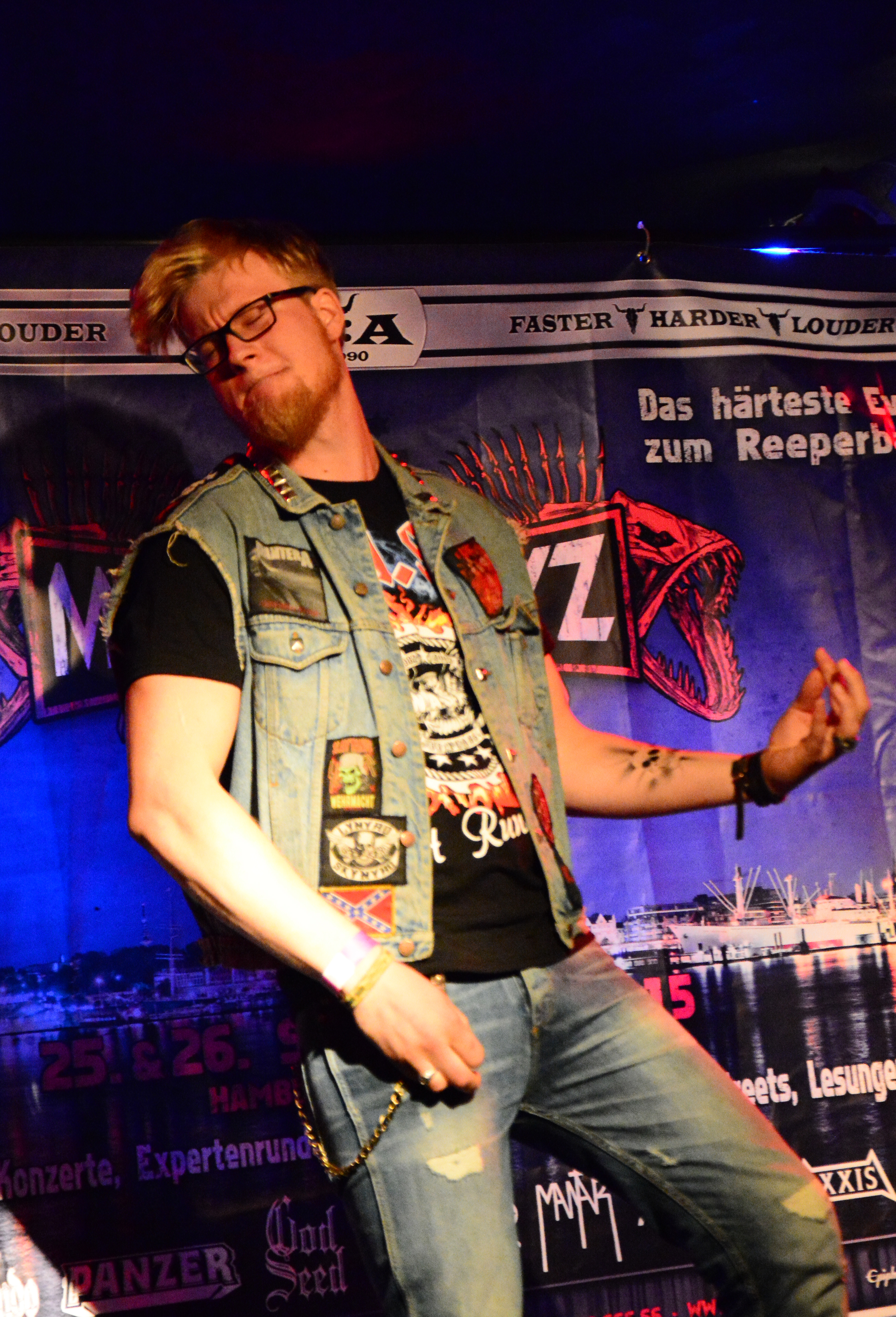 Air Guitar Contest bei den Hamburg Metal Dayz 2015